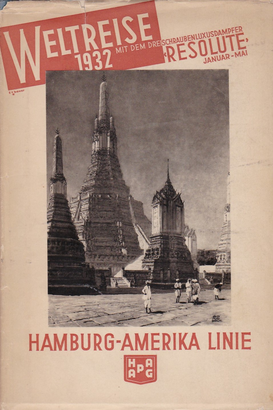 Einband des HAPAG Katalogs von 1932 zeigt ein Bild von Erich Kips